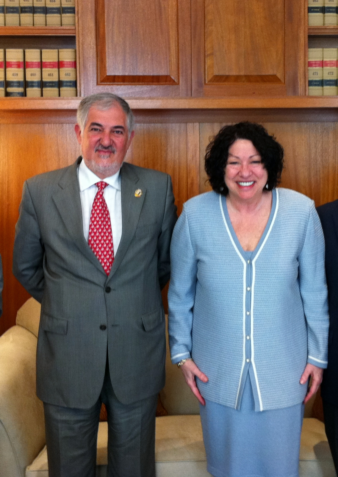 El Fiscal General español en el Tribunal Supremo de EEUU.